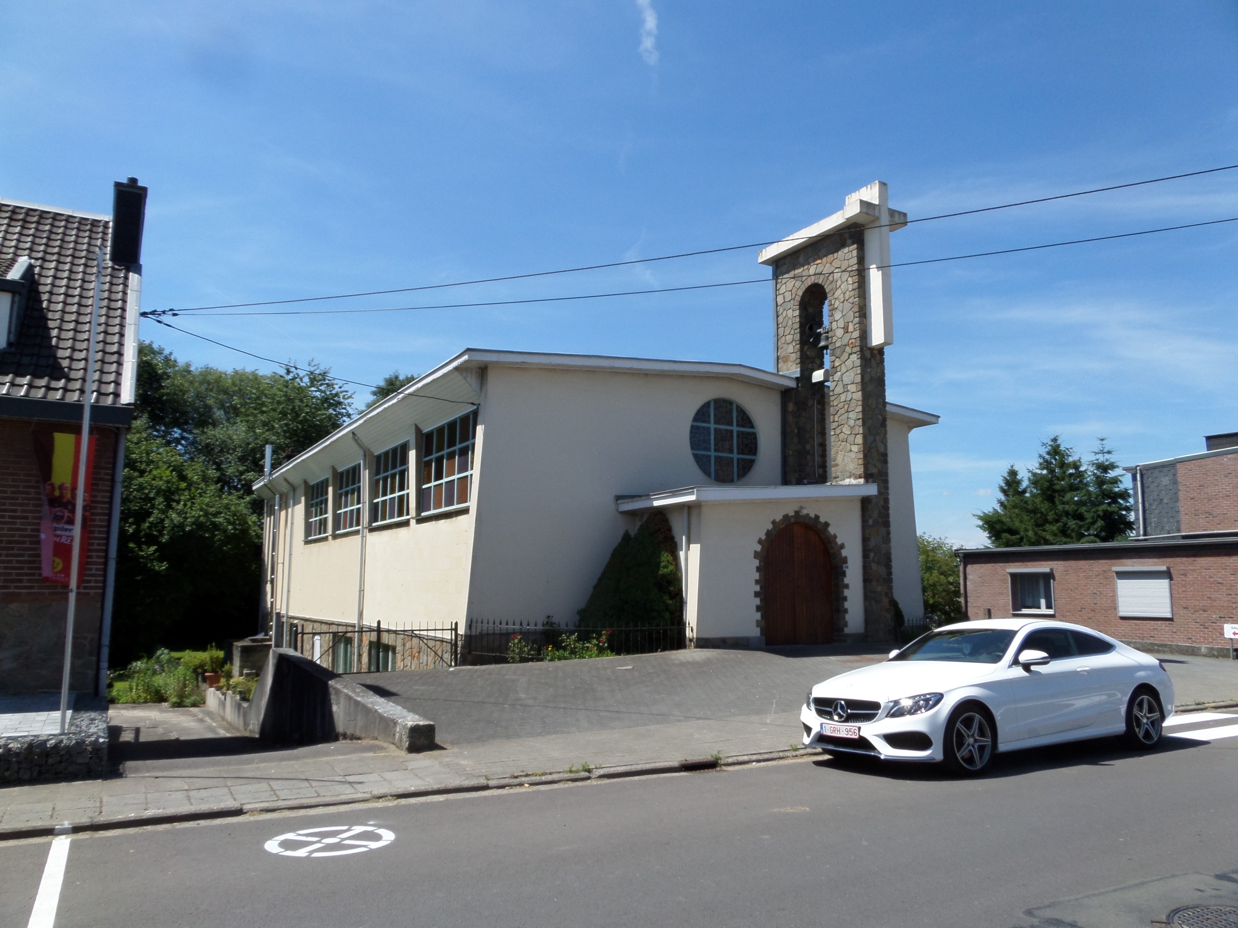 La chapelle Saint-Roch à Montzen-Gare